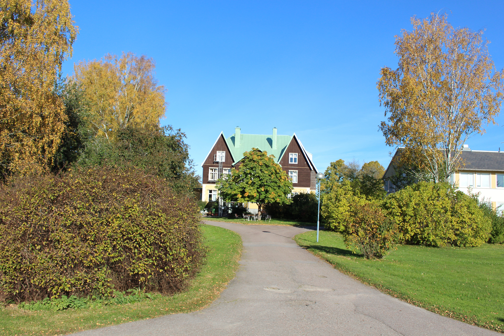 Sjöviks folkhögskola - Gamla skolan. Används idag som kök, matsal samt är Musiklinjens hemvist.